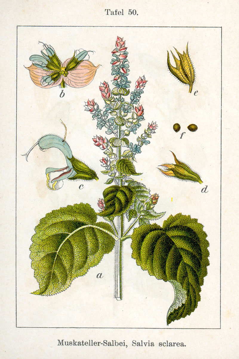 Salvia sclarea L. Original Description Muskateller-Salbei, Salvia sclarea